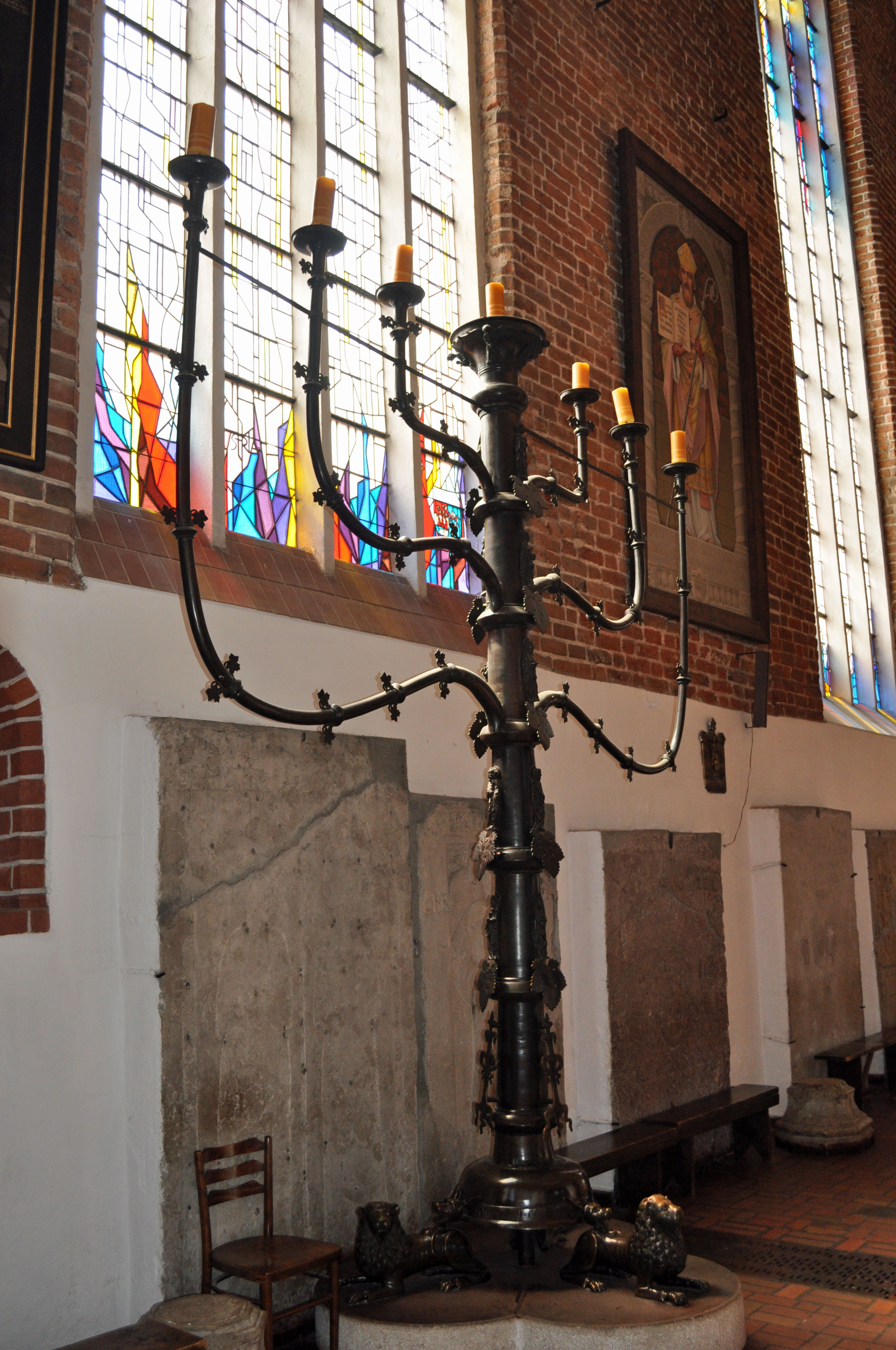 In Kołobrzeg (Polen). Aufgenommen am 27. Juli 2011.